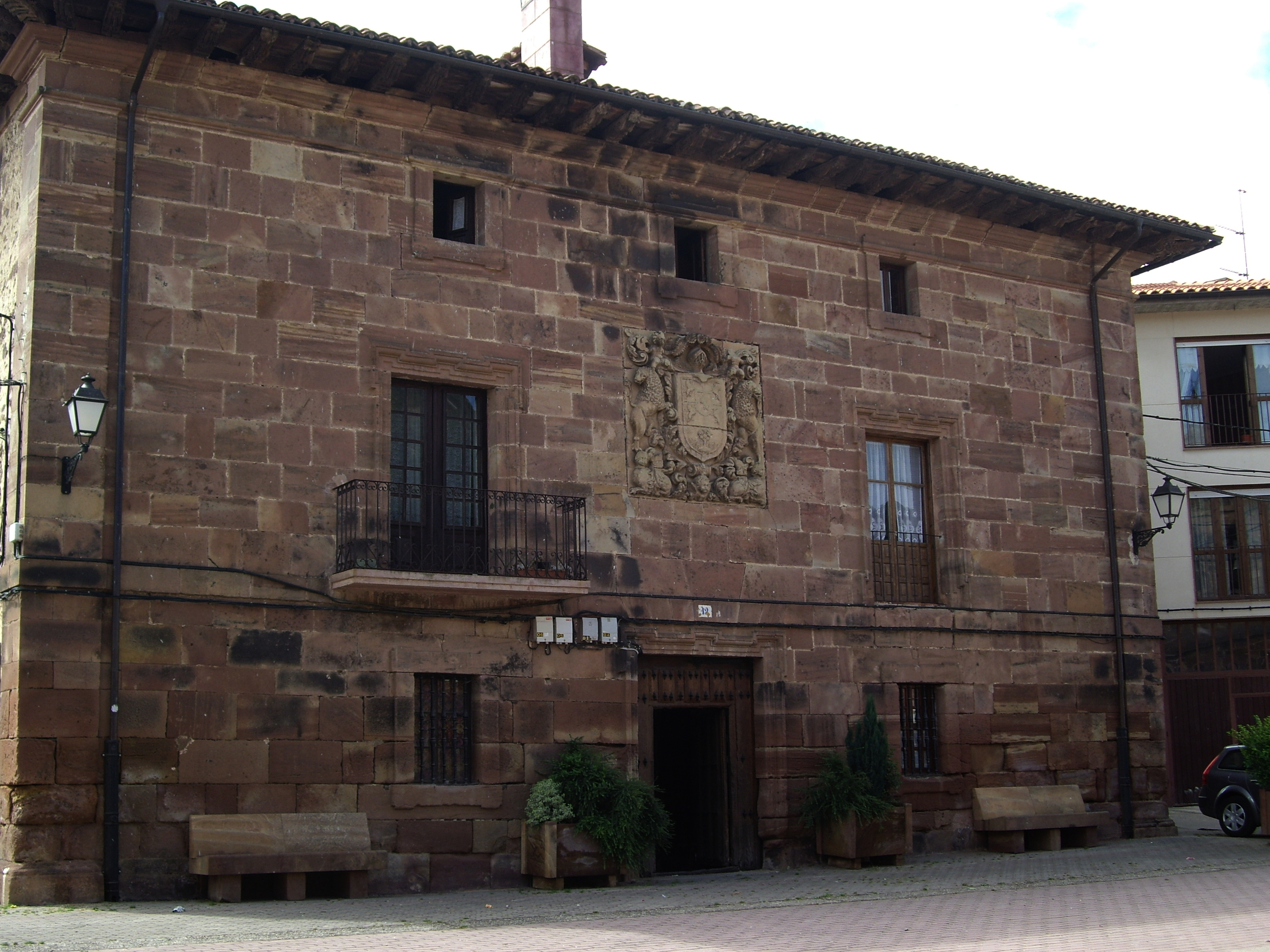 La Casa Grande en Valgañón, La Rioja, España